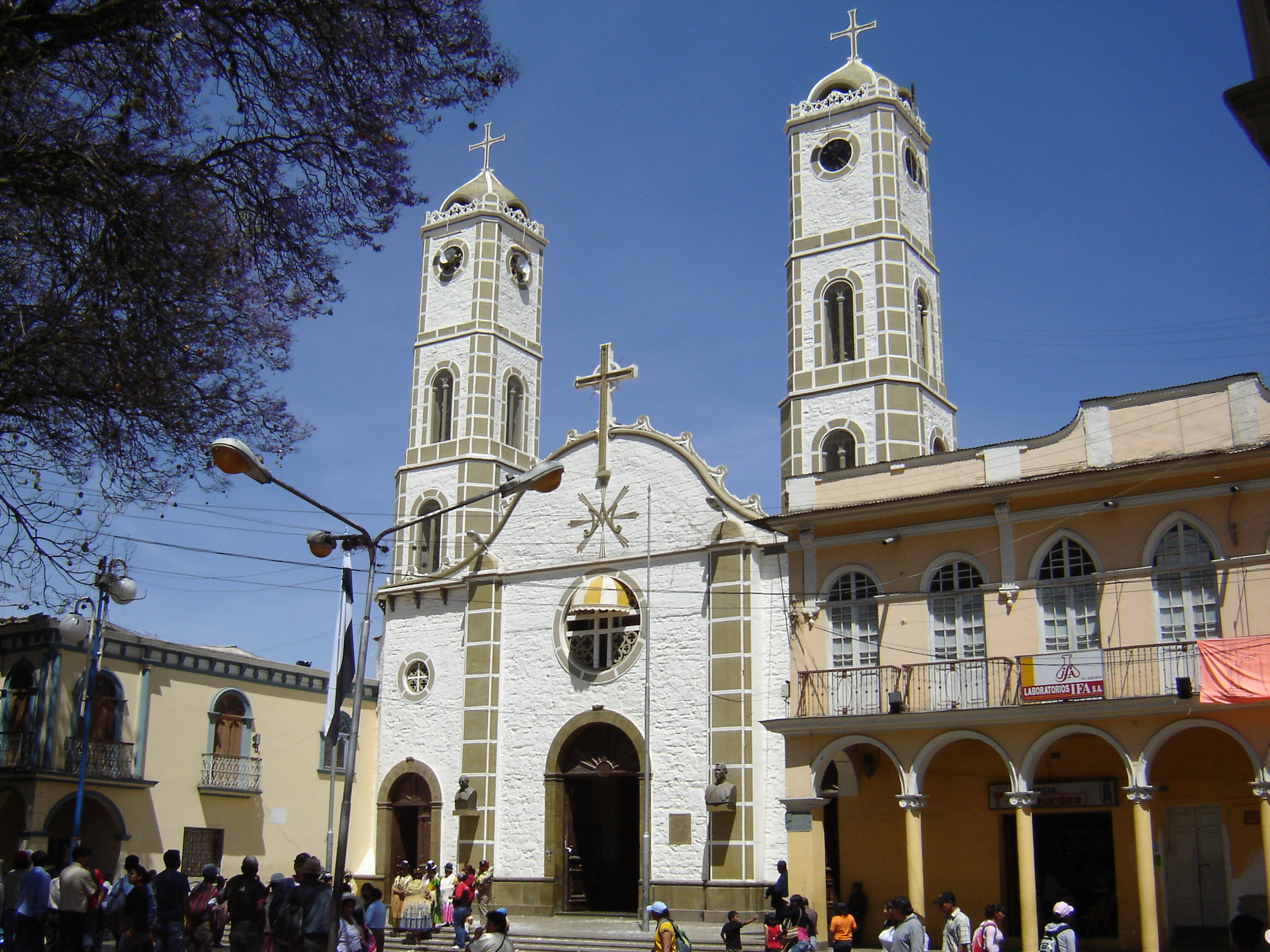 Templo de San Ildefonso, santuario de la Virgen María de Urqupiña, cuya construcción se inicio en 1908 y se concluyó en 1947. Runa Simi: San Ildifunsu wak'a, Urqupiñamanta Llump'aq Mariyaq wak'an, ruwaynin qallarikurqa 1908 watapi tukuychakurqataq 1947 watapi.